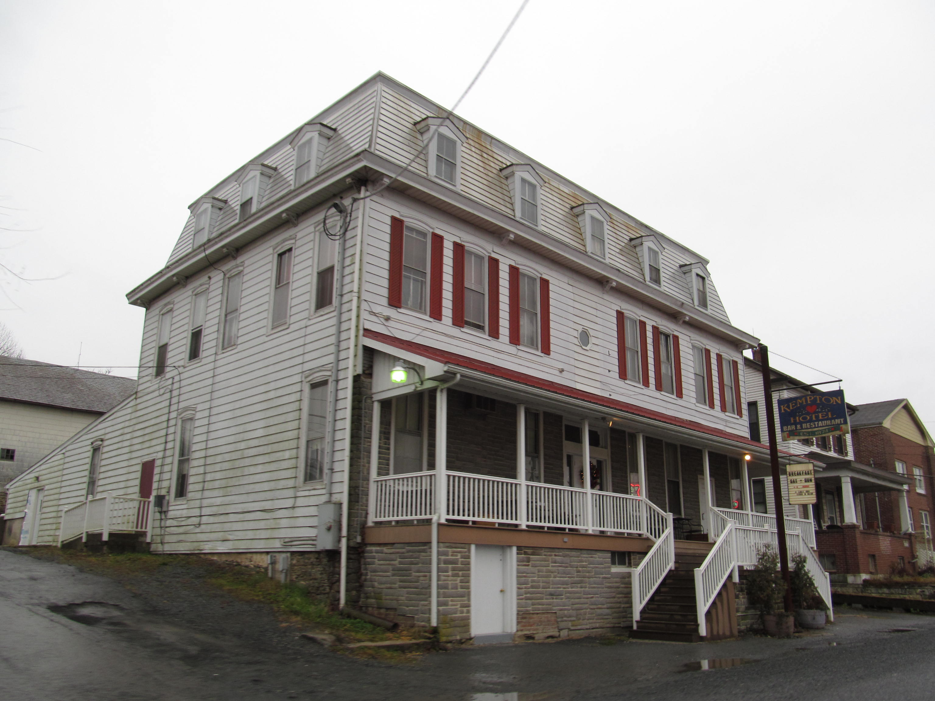 Kempton Hotel in Kempton, Pennsylvania